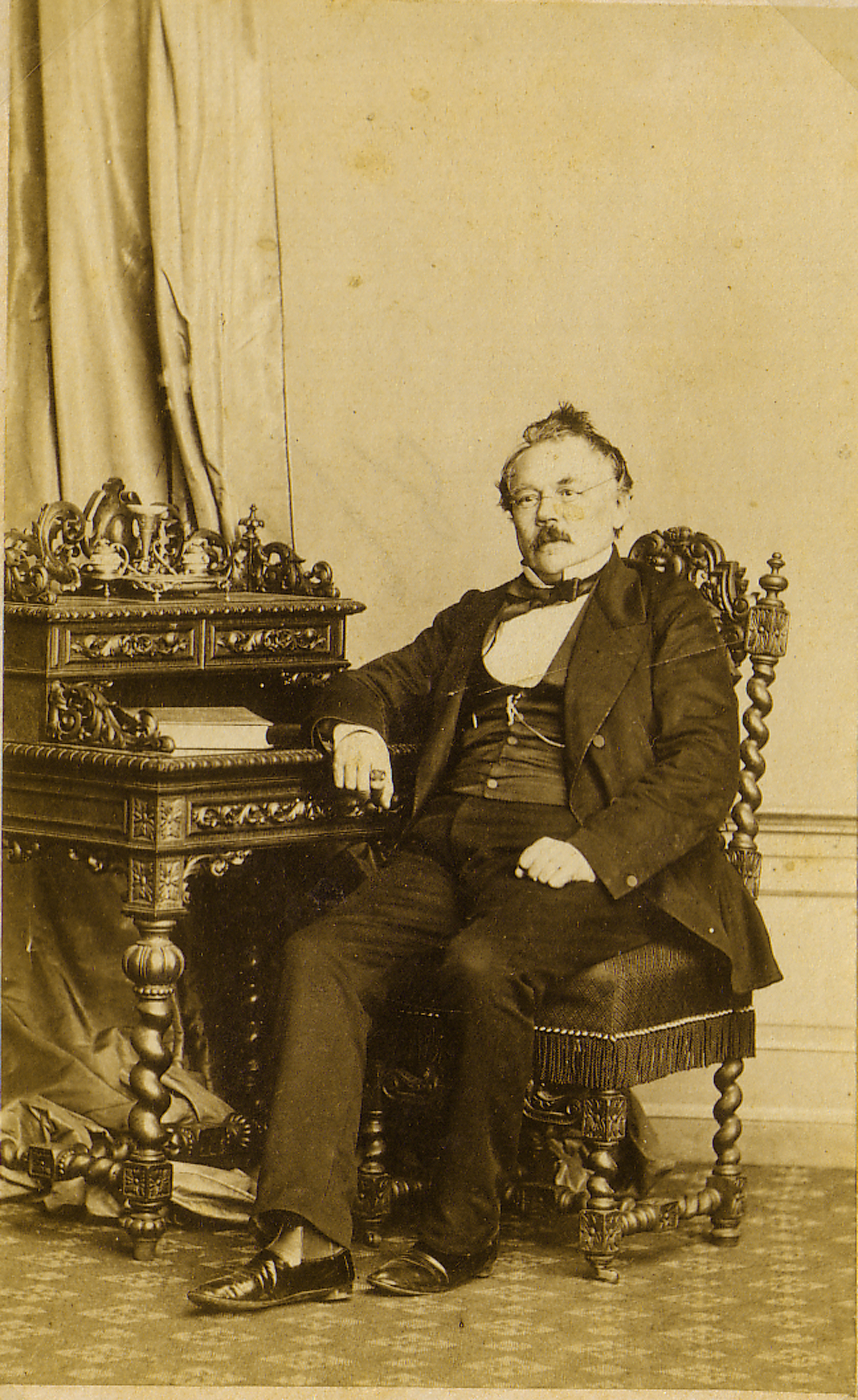 Joh.Matt. Gierse